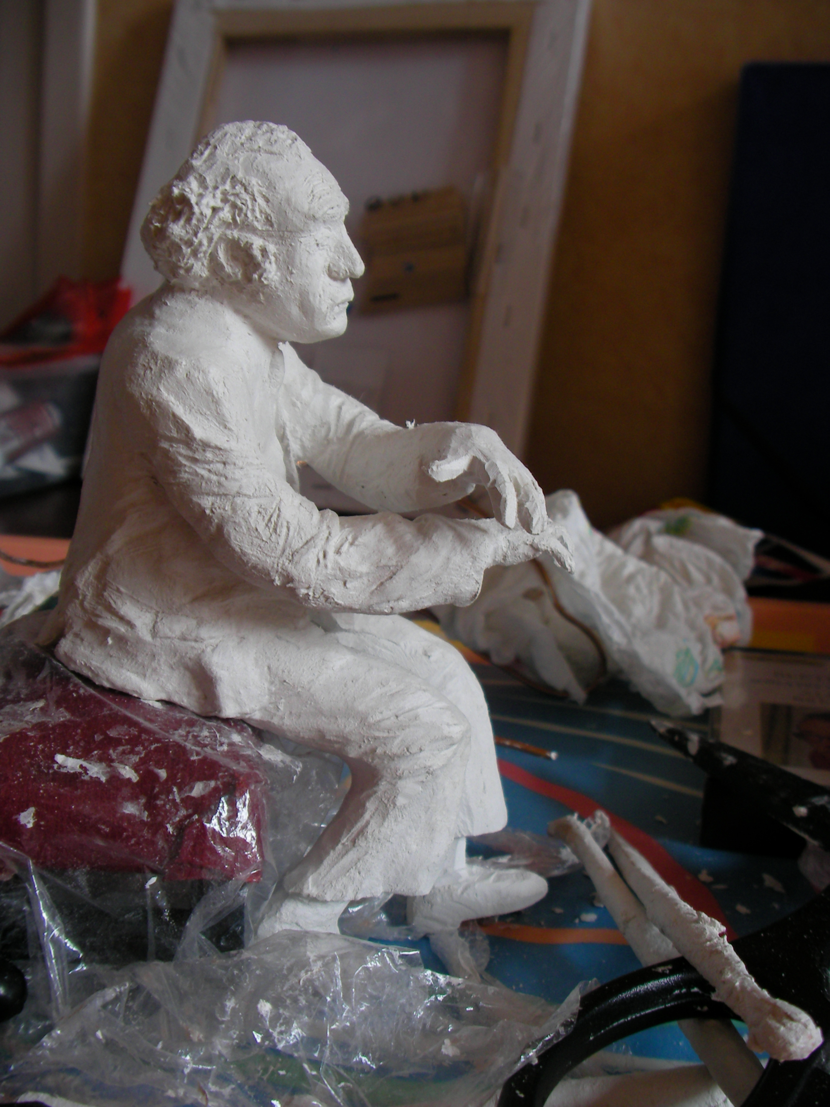 un exemple d'une réalisation avec une pâte autodurcissante